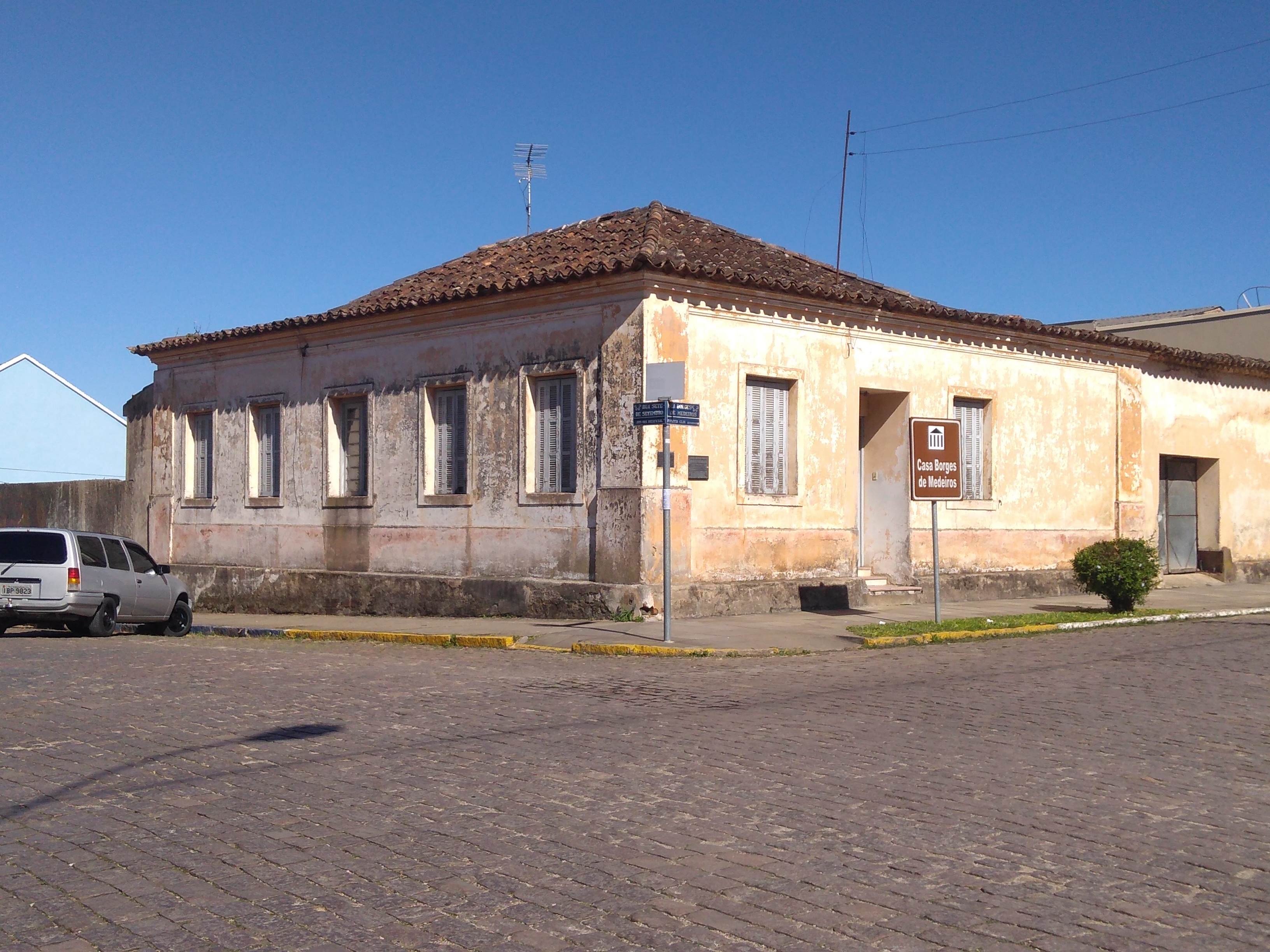 Casa onde nasceu o político e advogado brasileiro Antônio Augusto Borges de Medeiros, em Caçapava do Sul (Brasil).